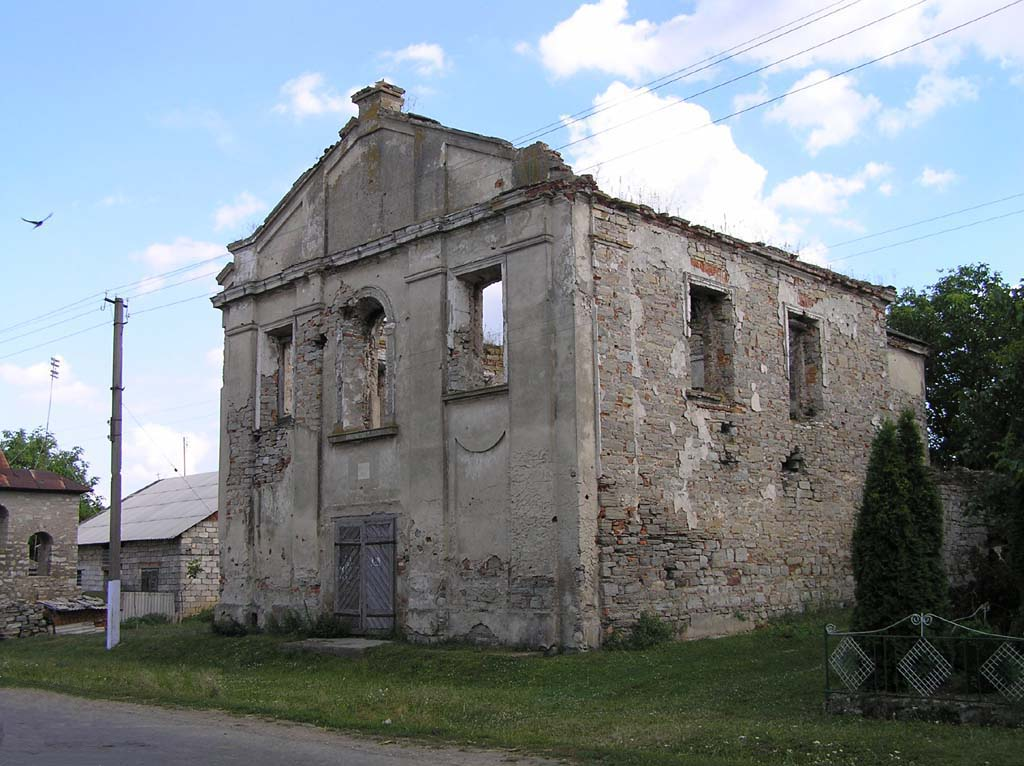 Розвалини костелу в селі Окопи (колись Окопи Святої Трійці)